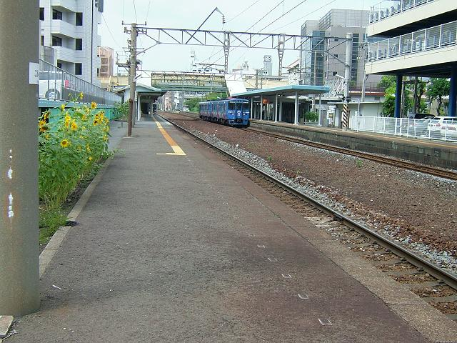 2005年8月27日撮影者-tamapon